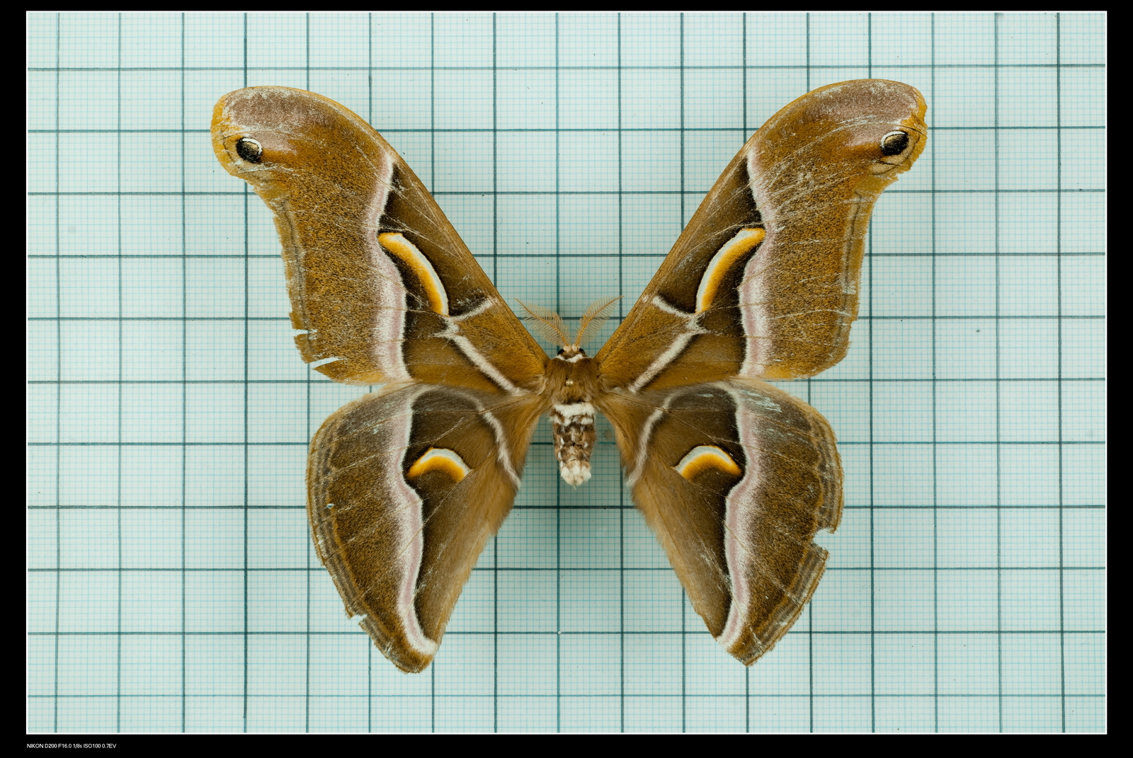 Samia wangi